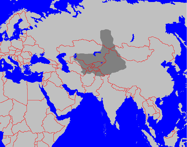 Reich Tschagatai in seiner größten Ausdehnung. (Original text: Darstellungskarte zeigt das Khanat Tschagatai, eines der mongolischen Nachfolgereiche Dschingis Khans. Es wurde durch Timur zerschlagen.) erstellt am: 17. Aug. 2004